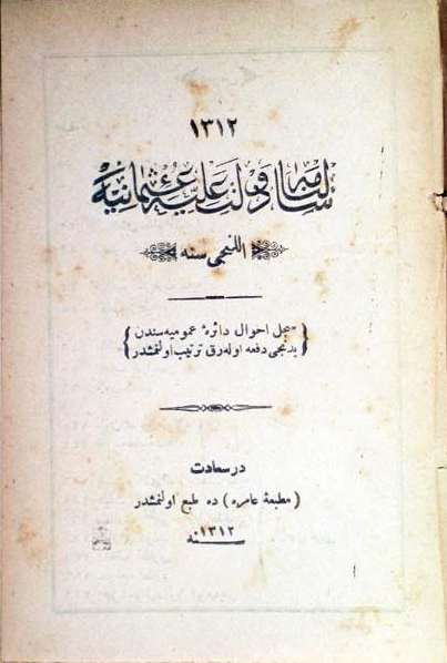 غلاف سالنامه سنة ١٣١٢ هجري